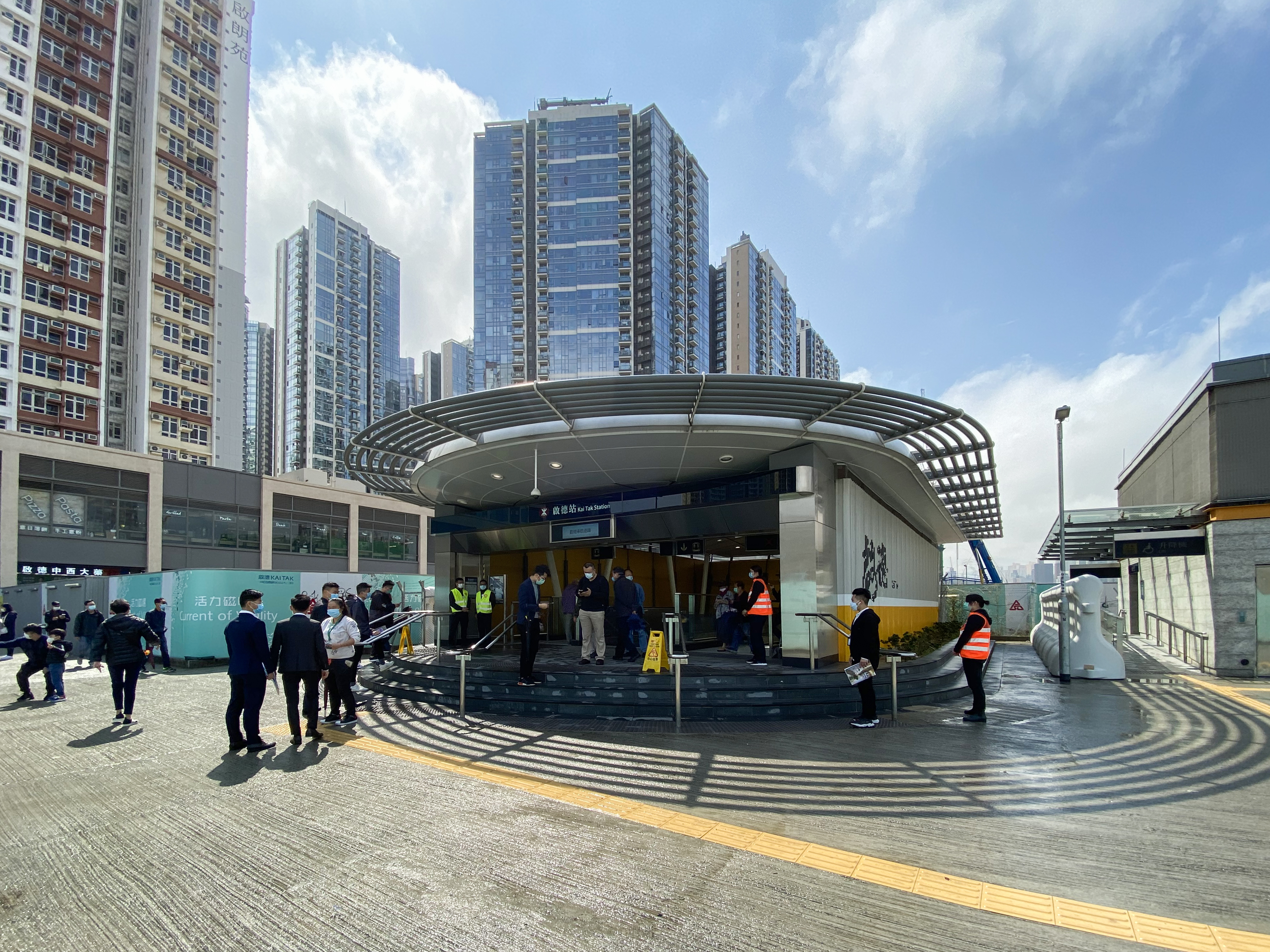 Kai Tak Station Exit A